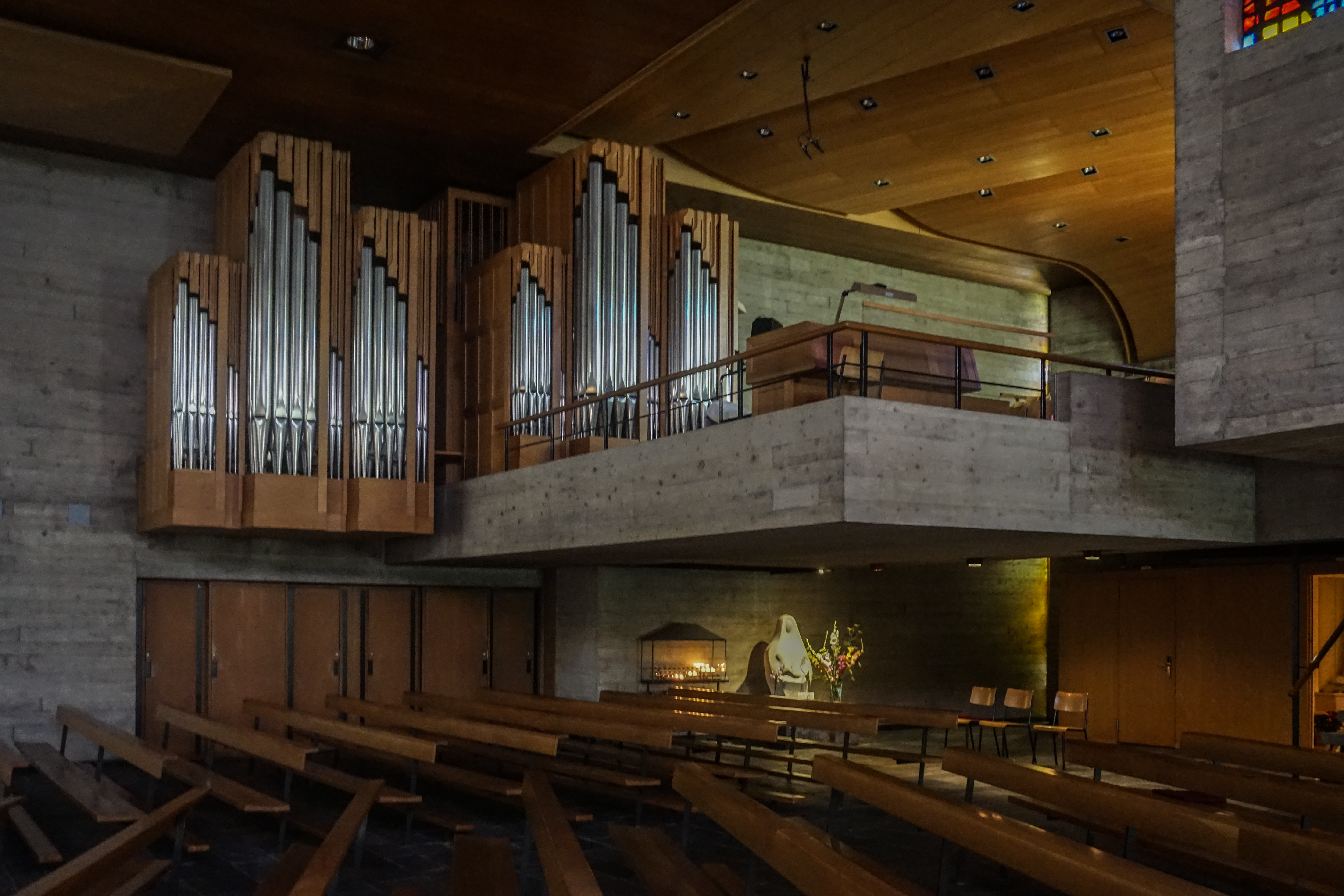 Notre-Dame de la Prévôté Orgel